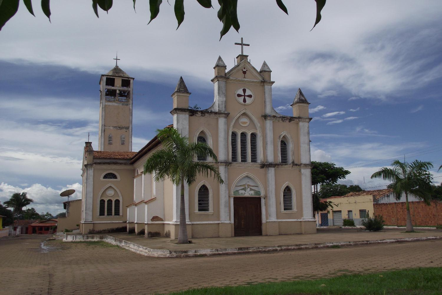 Igreja São Pedro de Alcântara. Carolina Maranhão, Brasil.